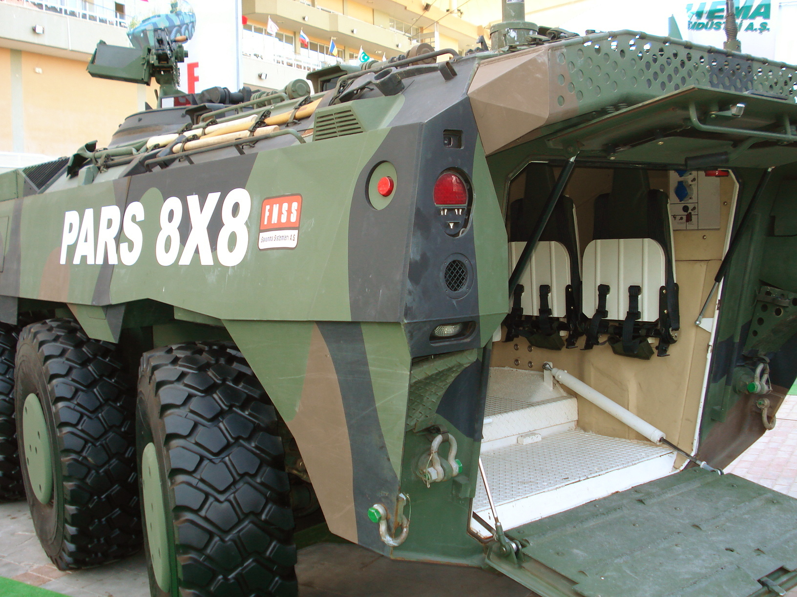 IDEF '07 Savunma Fuarı'nda çekildi.FNSS Pars. 23 Mayıs 2007